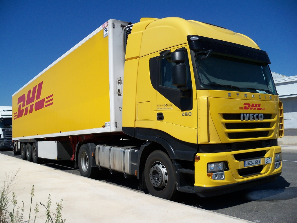 DHL - Deutsch Post World Net, Mail Express Logistics Finance: Trailer con cabeza tractora IVECO 'Stralis 450'-E5 - 1624 GFY (matriculado en junio del 2008), La Granadina, San Isidro de Albatera (Provincia de Alicante, España).